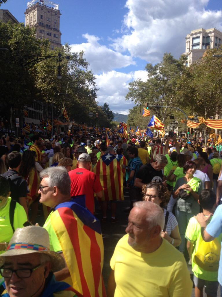 La diada del sí rally 15:30